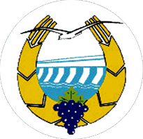 Герб Цимлянска